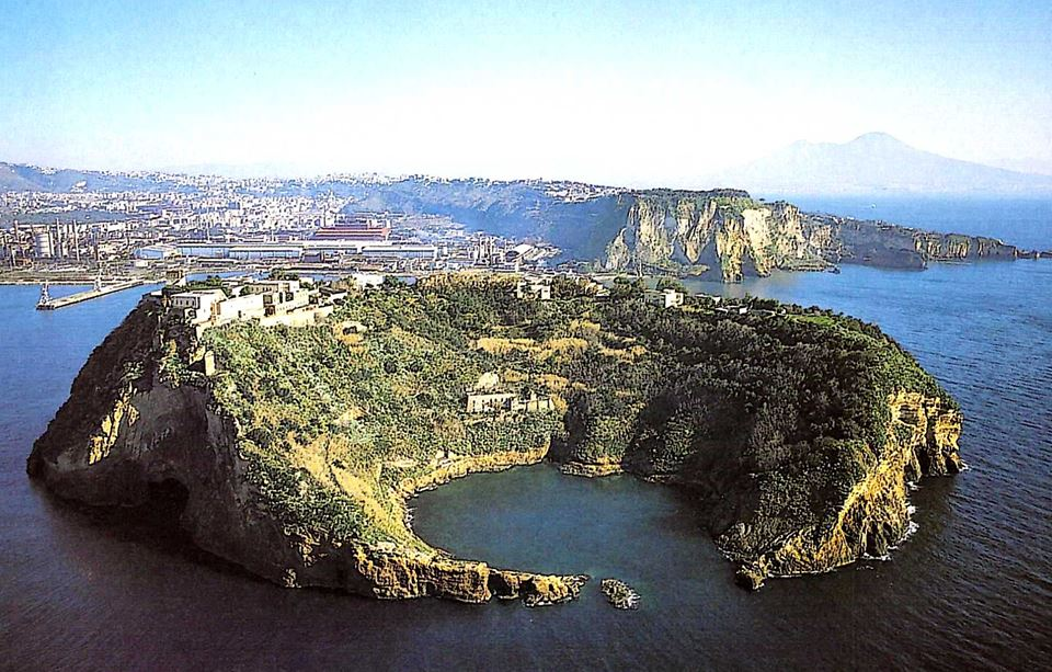 Napoli, isola di Nisida (veduta aerea da S-W). Autore sconosciuto. Foto databile agli anni '70 per le industrie di Bagnoli e Coroglio (sullo sfondo) in piena attività.